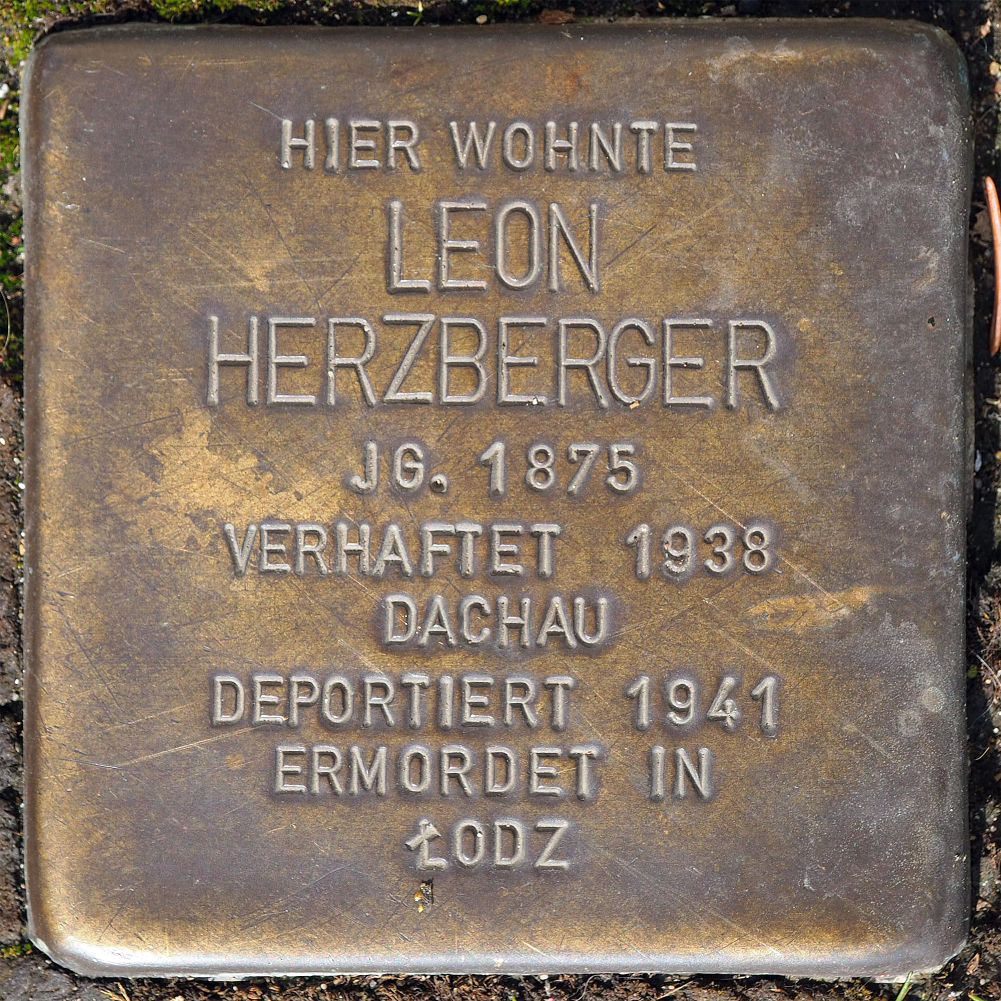 Stolpersteine MG: Herzberger, Leon